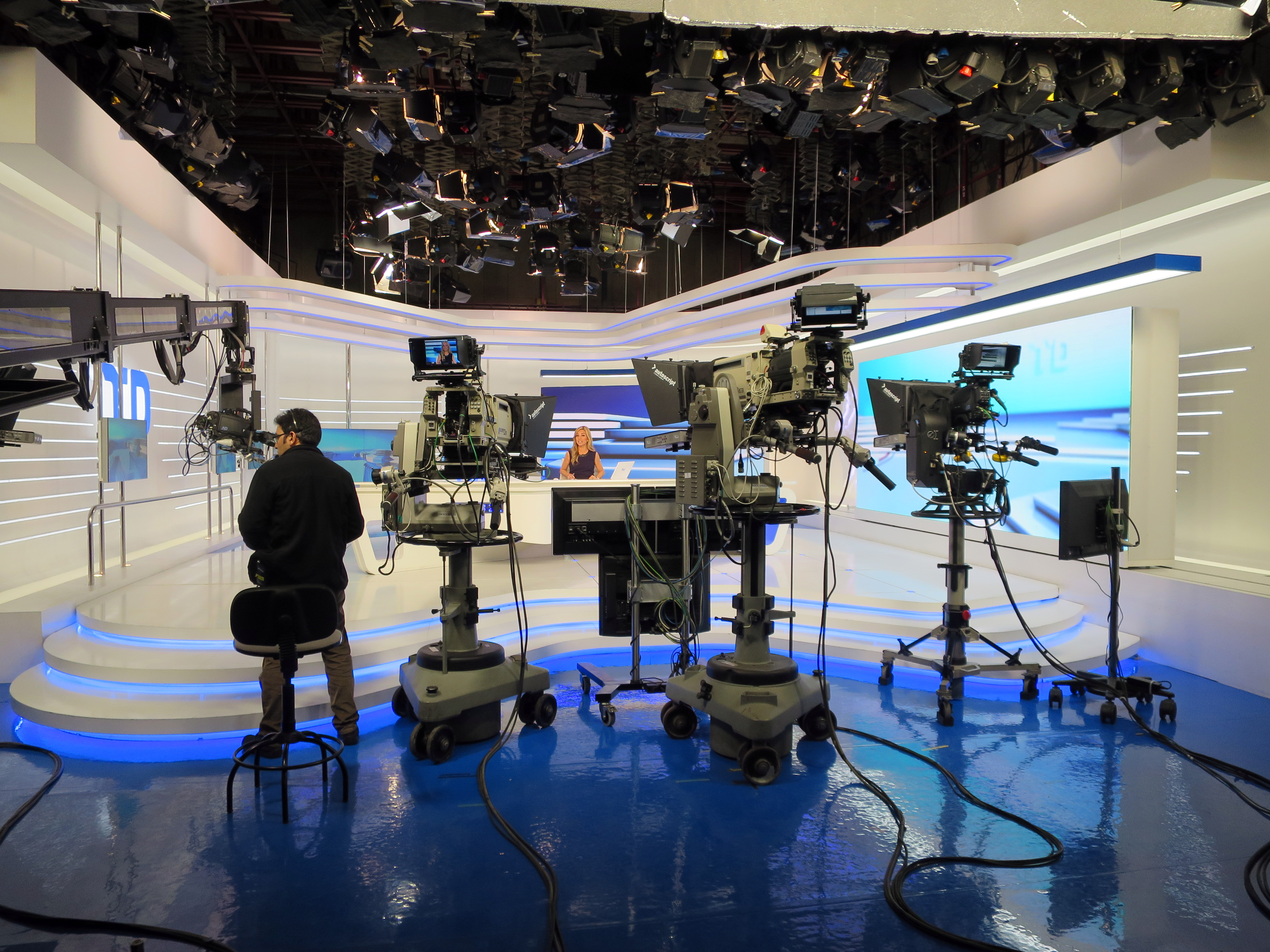 Informativos RTVE